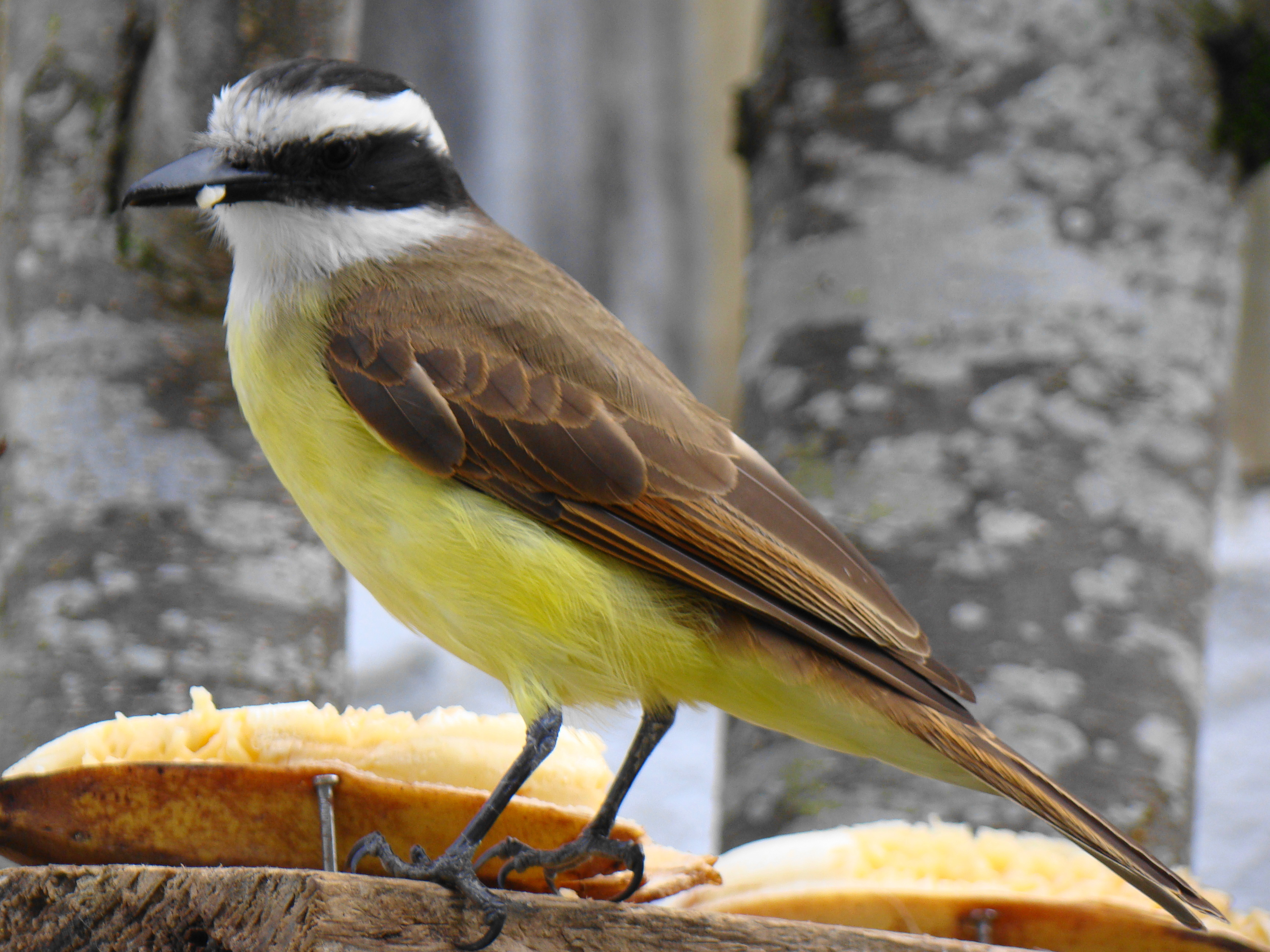 Pitangus sulphuratus Bem-Te-Vi